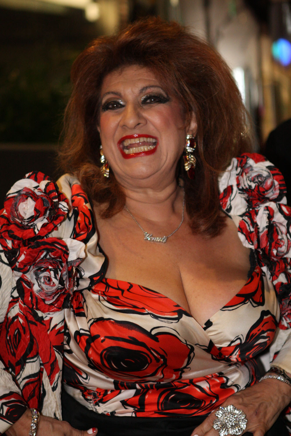 Maria Venuti